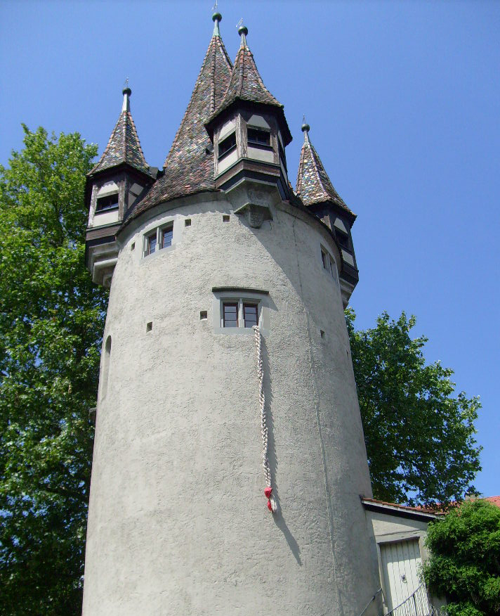 Rapunzel-Zitat am Diebsthurm in Lindau (Bodensee)